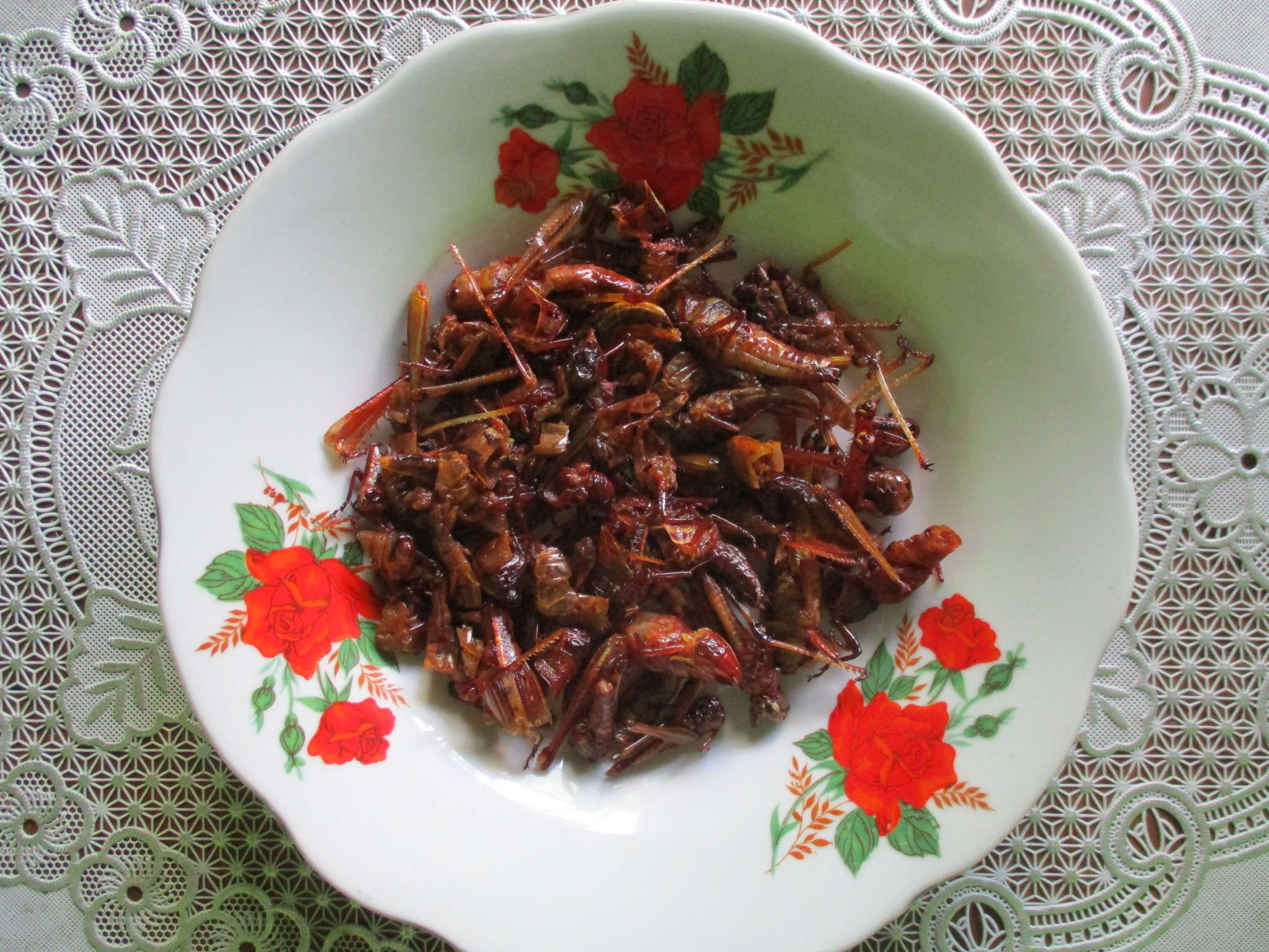 Jawa: Walang goreng kang dideleng saka dhuwur.